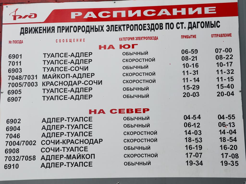 Расписание электричек - Дагомыс (2013)